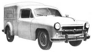 Graciela